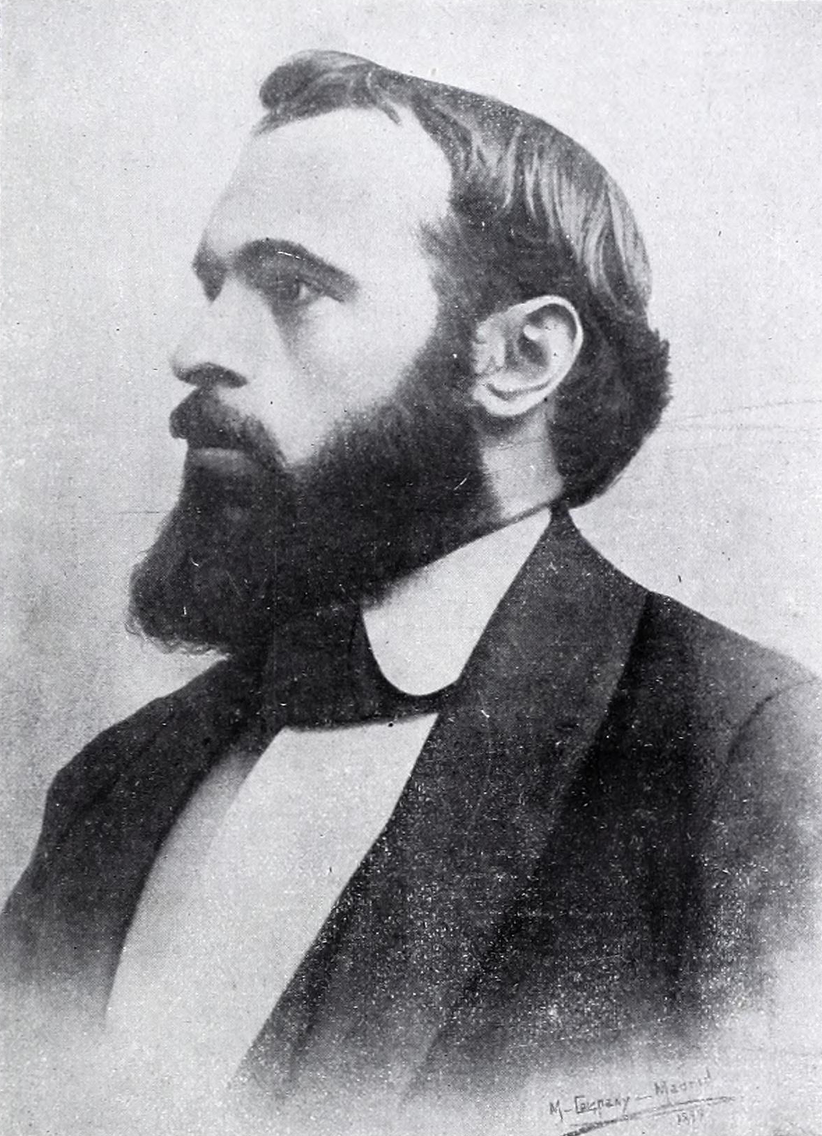 Ángel Ganivet. Fotografiado por Compañy en Madrid (finales del s. XIX).